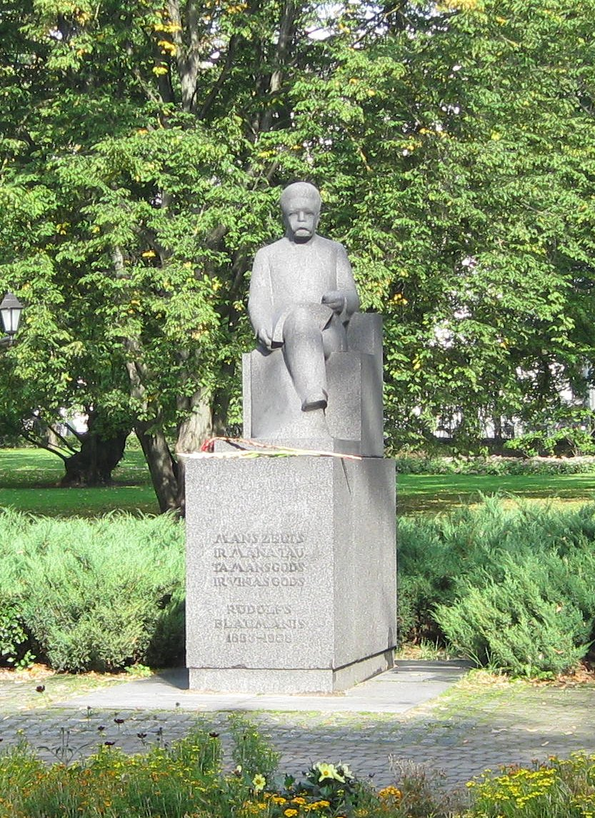 Pilsētas kanāla apstādījumi, Rīga, Aspazijas bulvāris